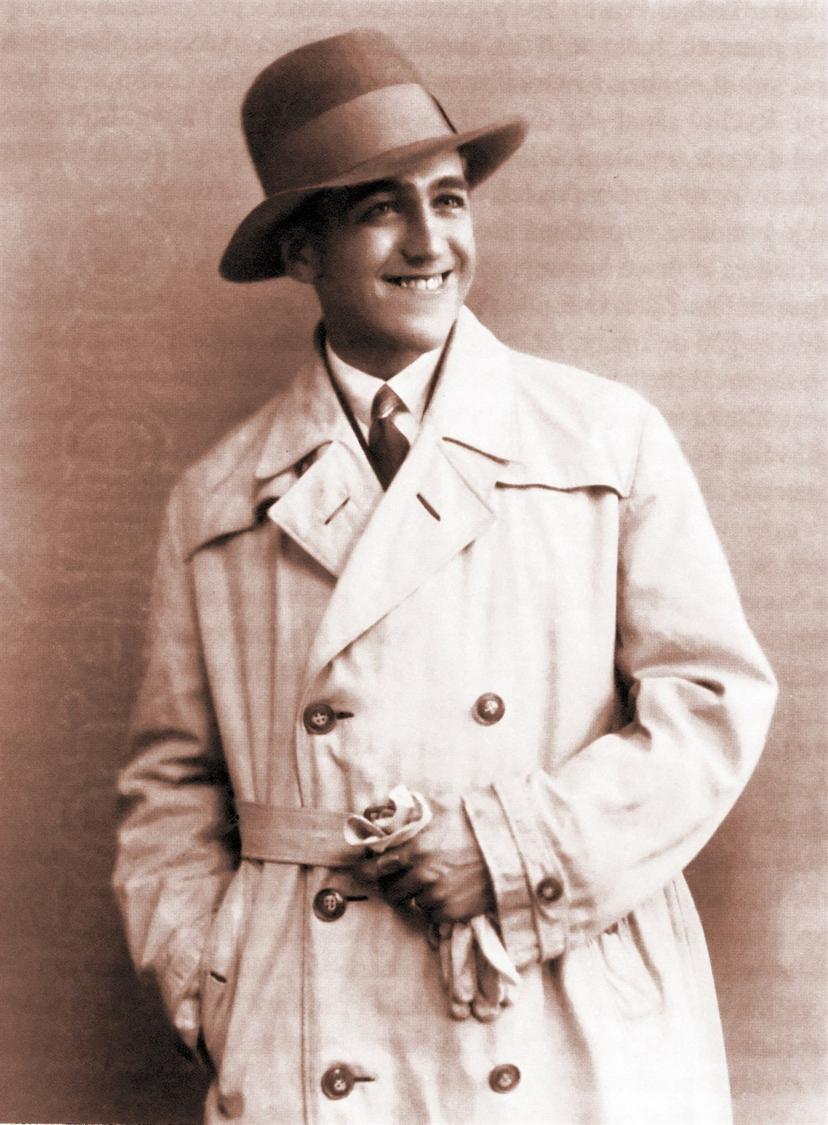 Ivo Váňa Psota (1908 - 1952), Český tanečník, choreograf, divadelní (baletní) režisér a pedagog.